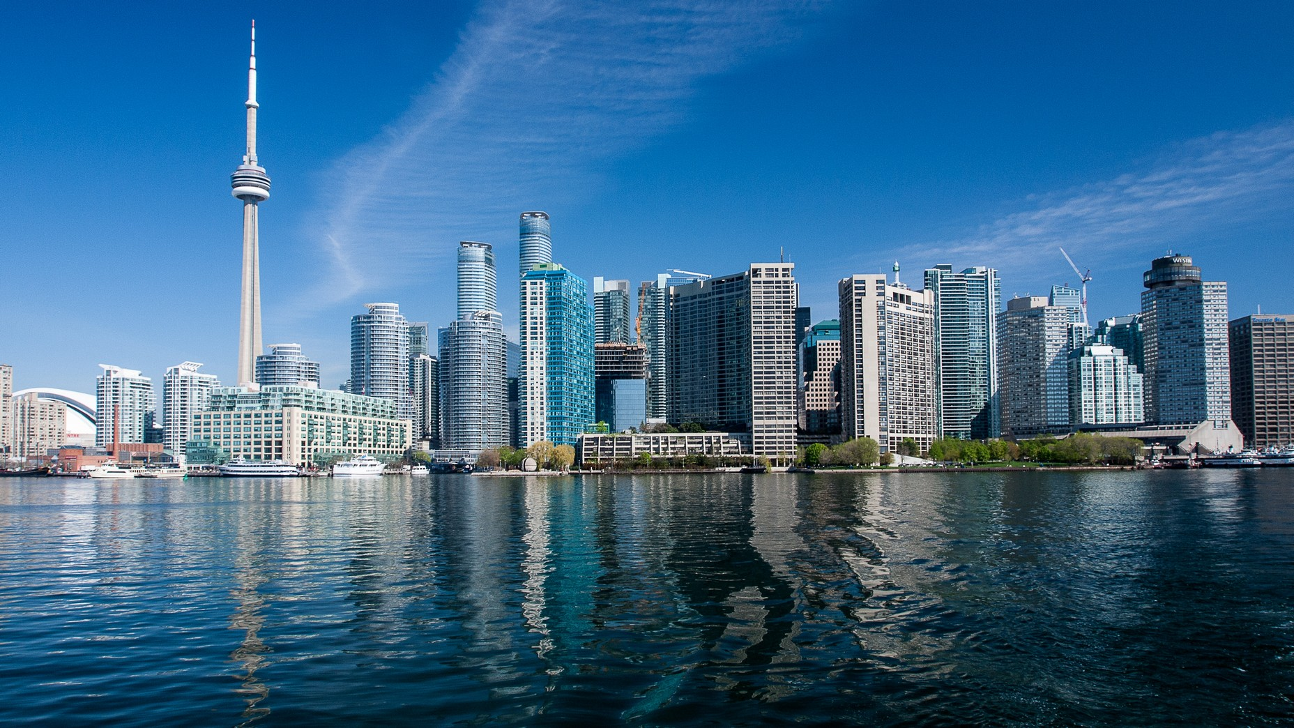 Toronto